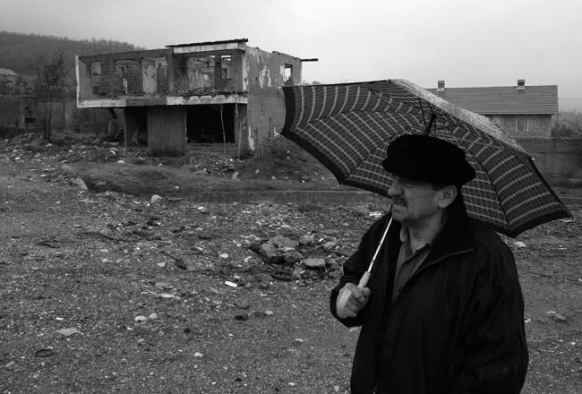 Косово и Метохија: Српски повратник у потпуно порушено село Бело поље код Пећи. Фотографије из пројекта "Корени душе". Фото:Дарко Дозет